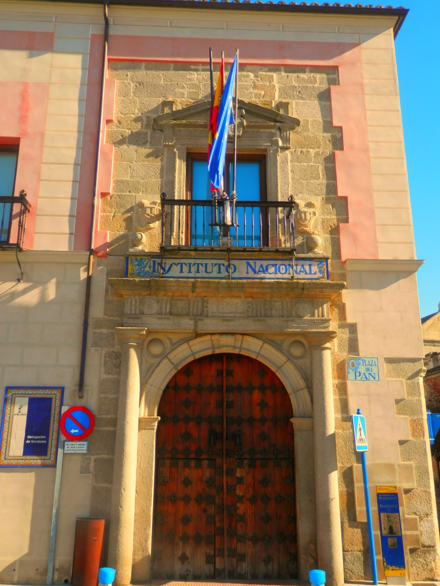 Antiguo Ayuntamiento de Talavera de la Reina